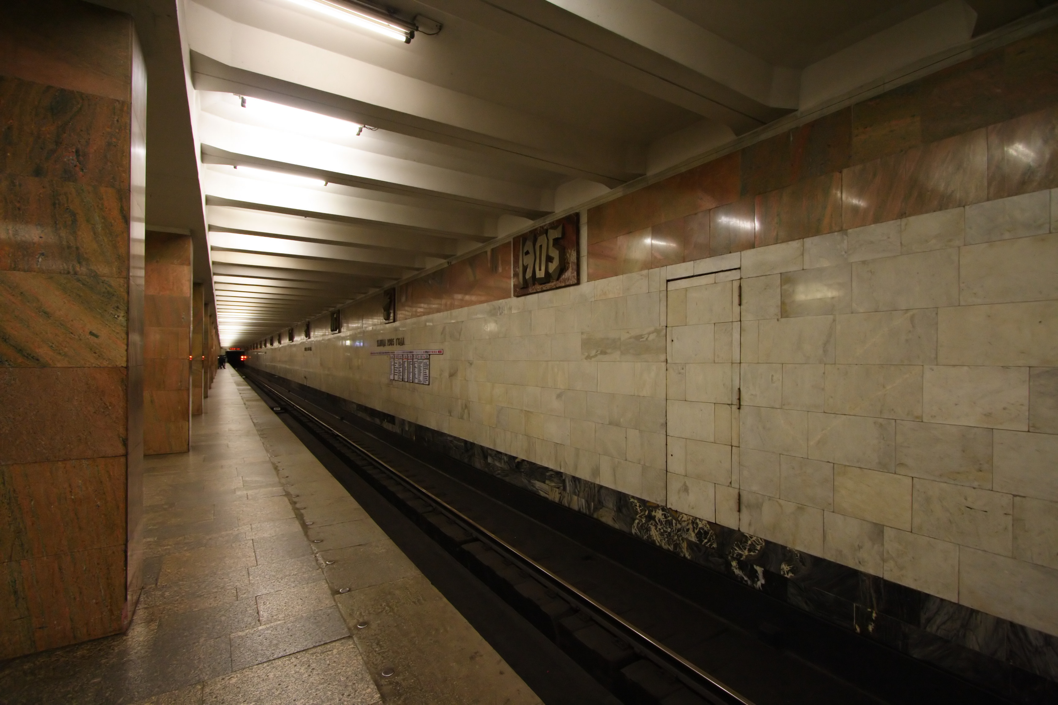 Станция метро улица 1905 года, название, стена, столп